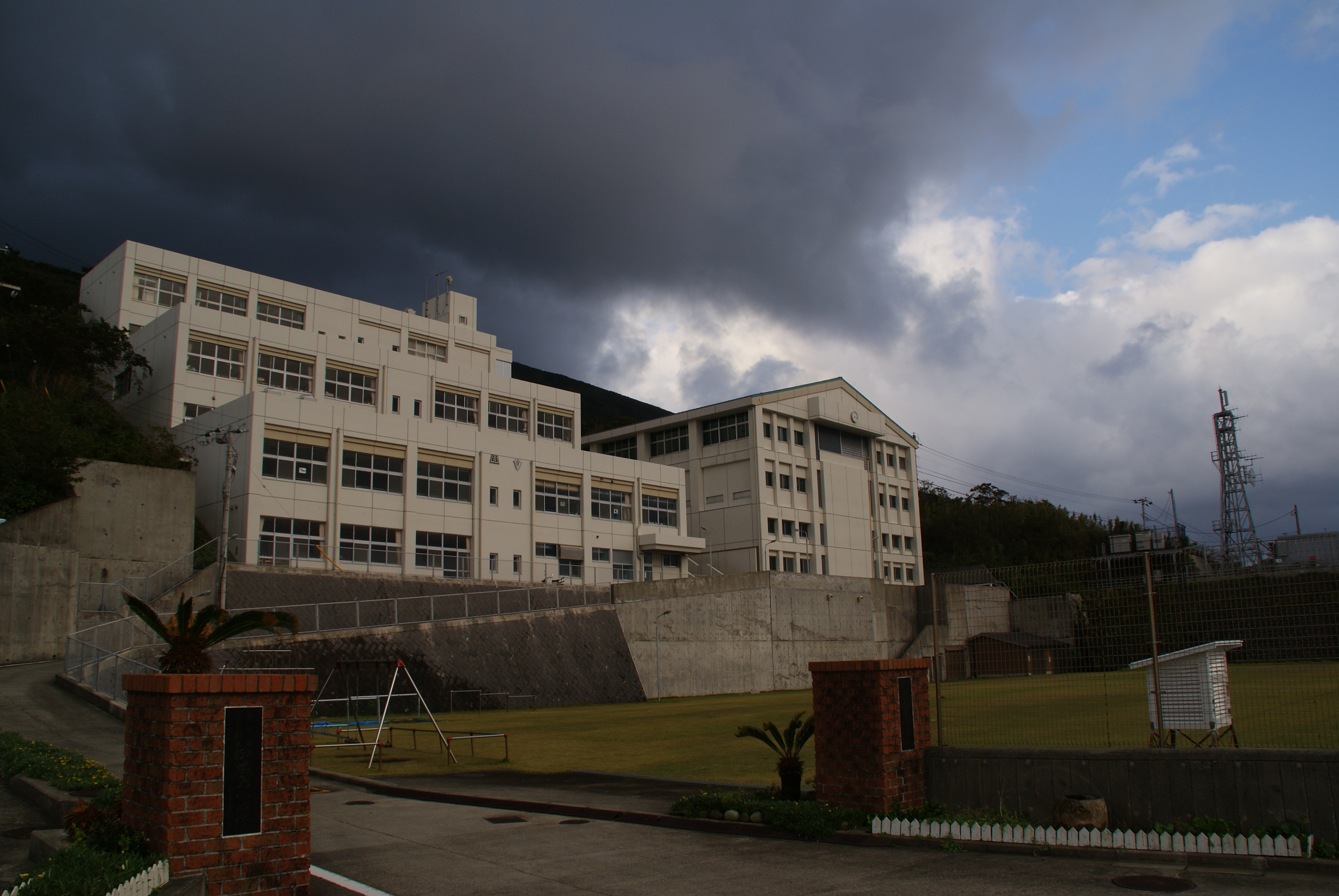 御蔵小学校